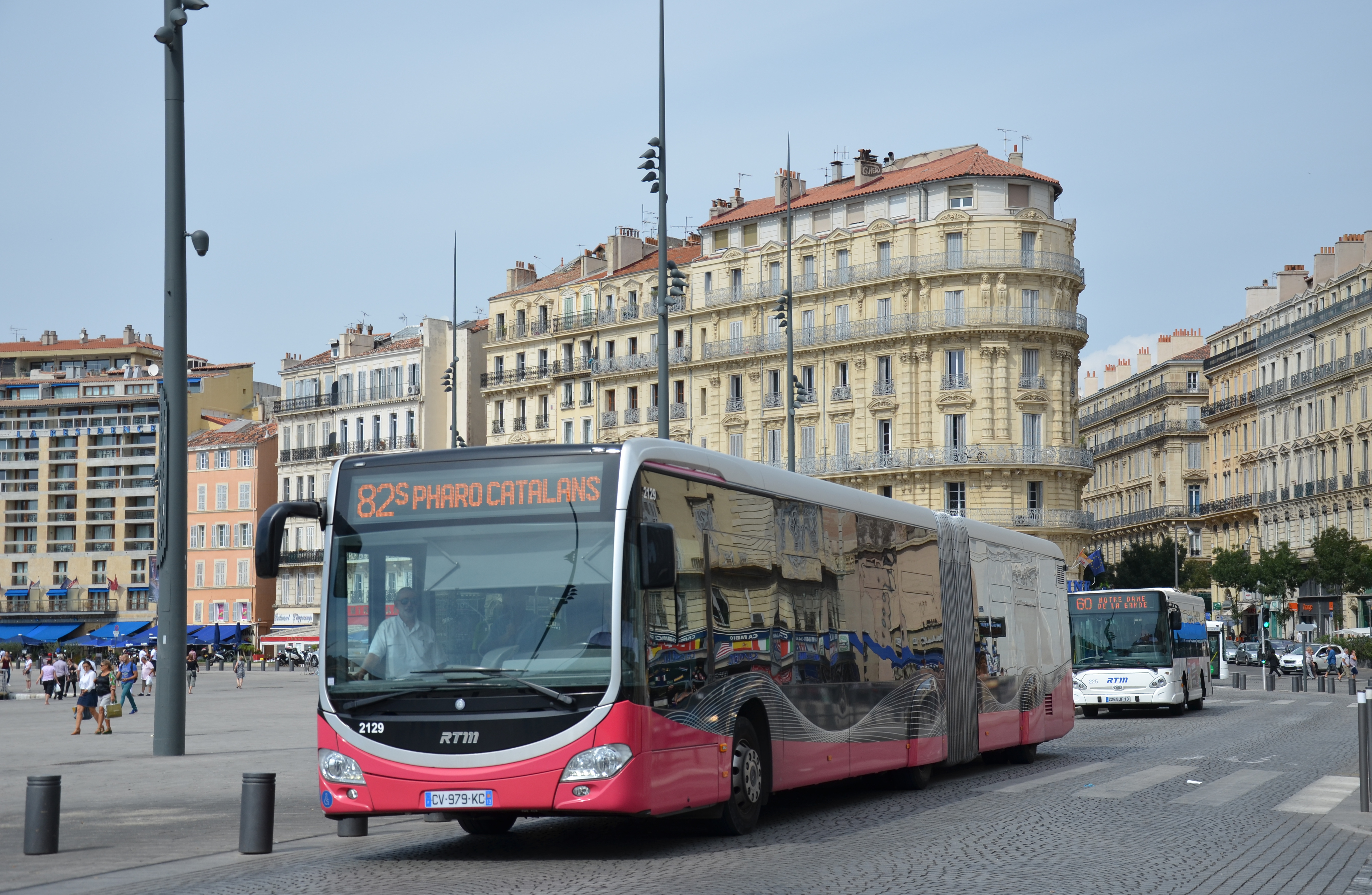 Mercedes Citaro G C2 n°2129 sur la ligne 82s, à la station Métro Vieux Port.